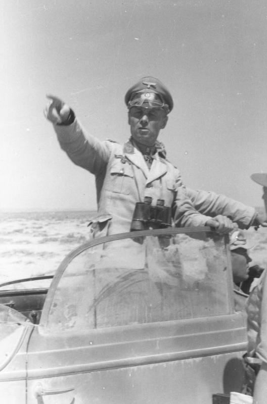 16.6.1942 Generaloberst Rommel mit seinem Stab, ca. 46 km westl. von Tobruk